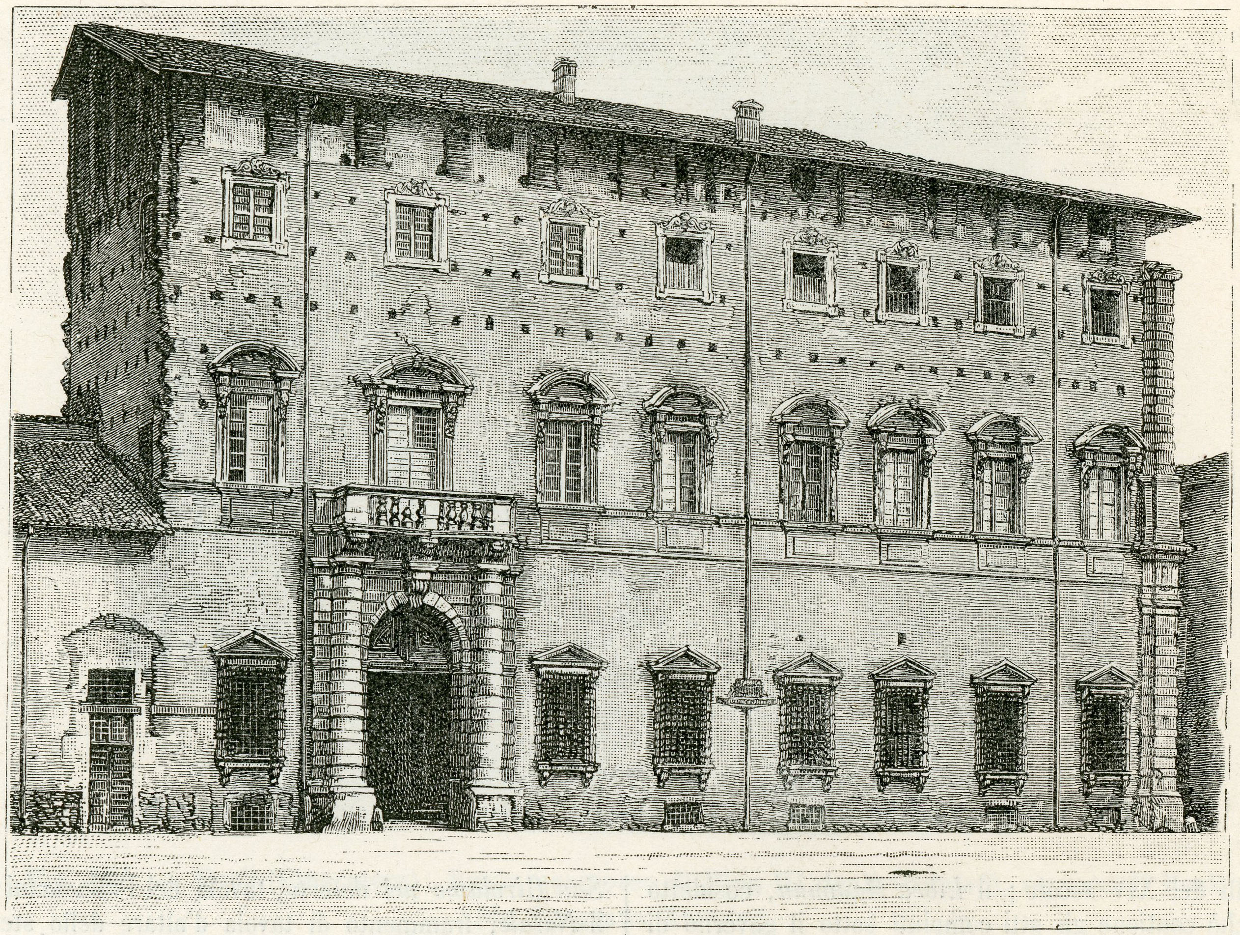 Forlì: Palazzo Paolucci-Piazza, prima del restauro, (xilografia).